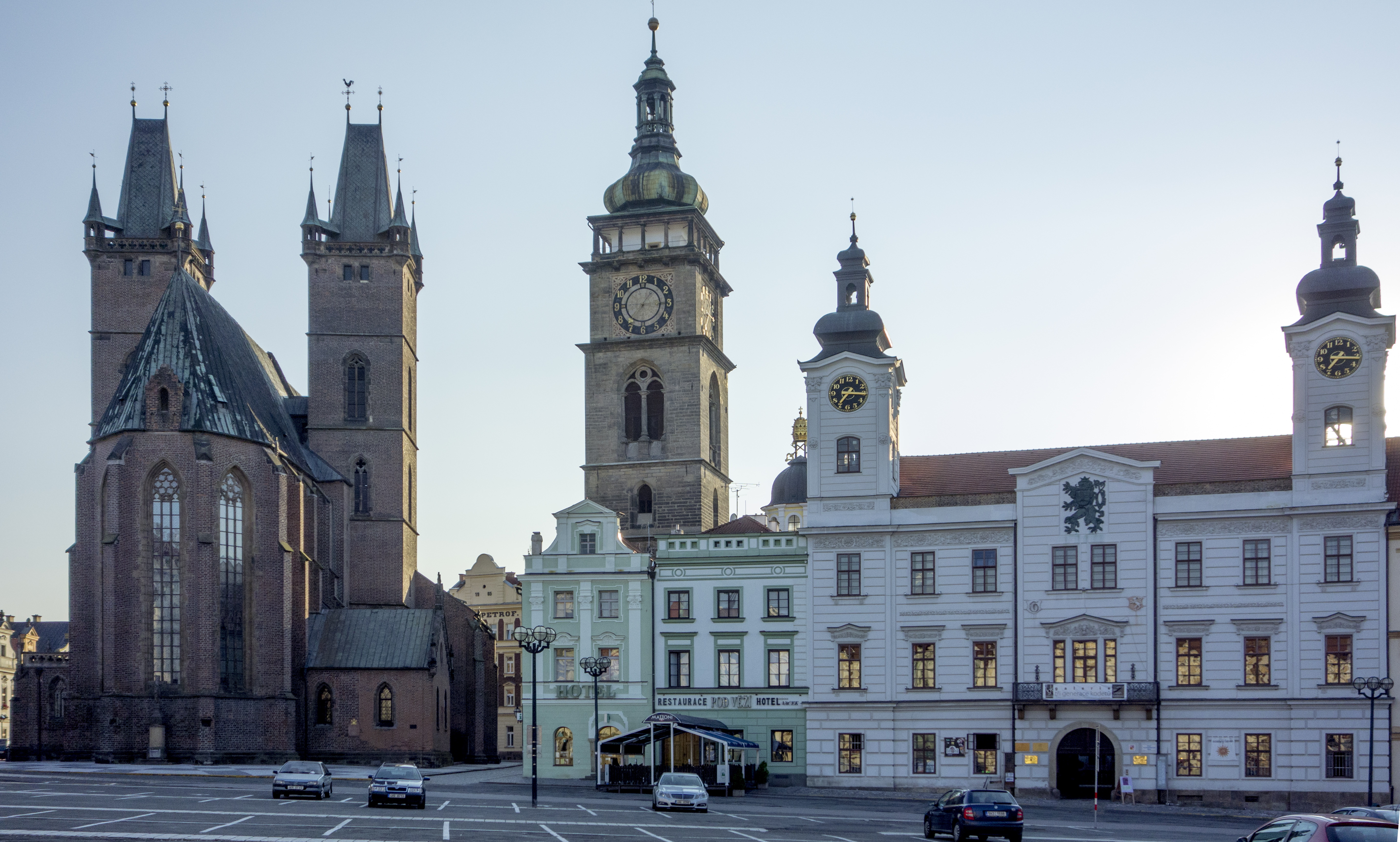 Velké náměstí (Hradec Králové)